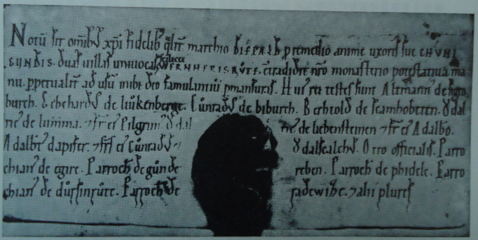 Urkunde, in der die Stadt Tirschenreuth das erste Mal erwähnt wird